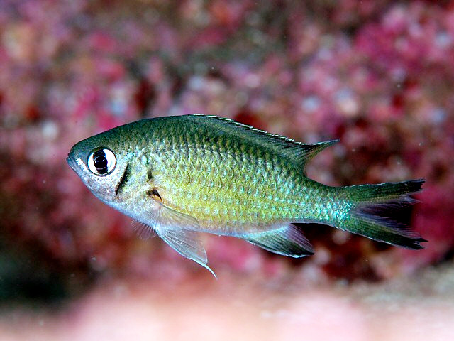 タカサゴスズメダイ Chromis weberi